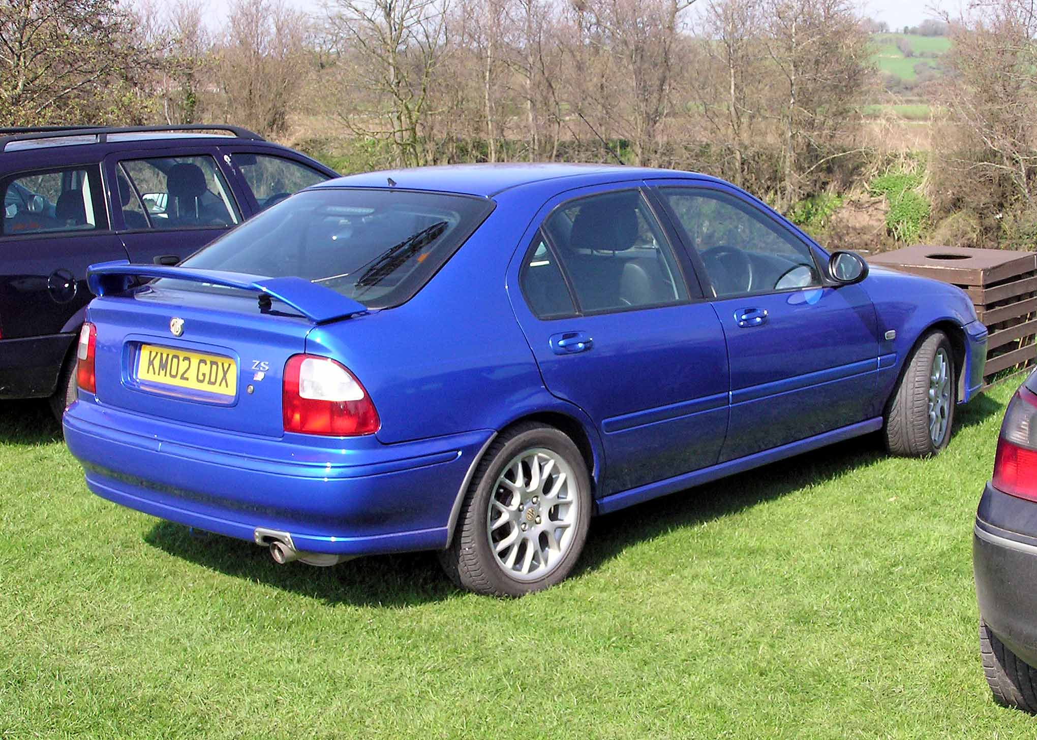 2002 MG ZS